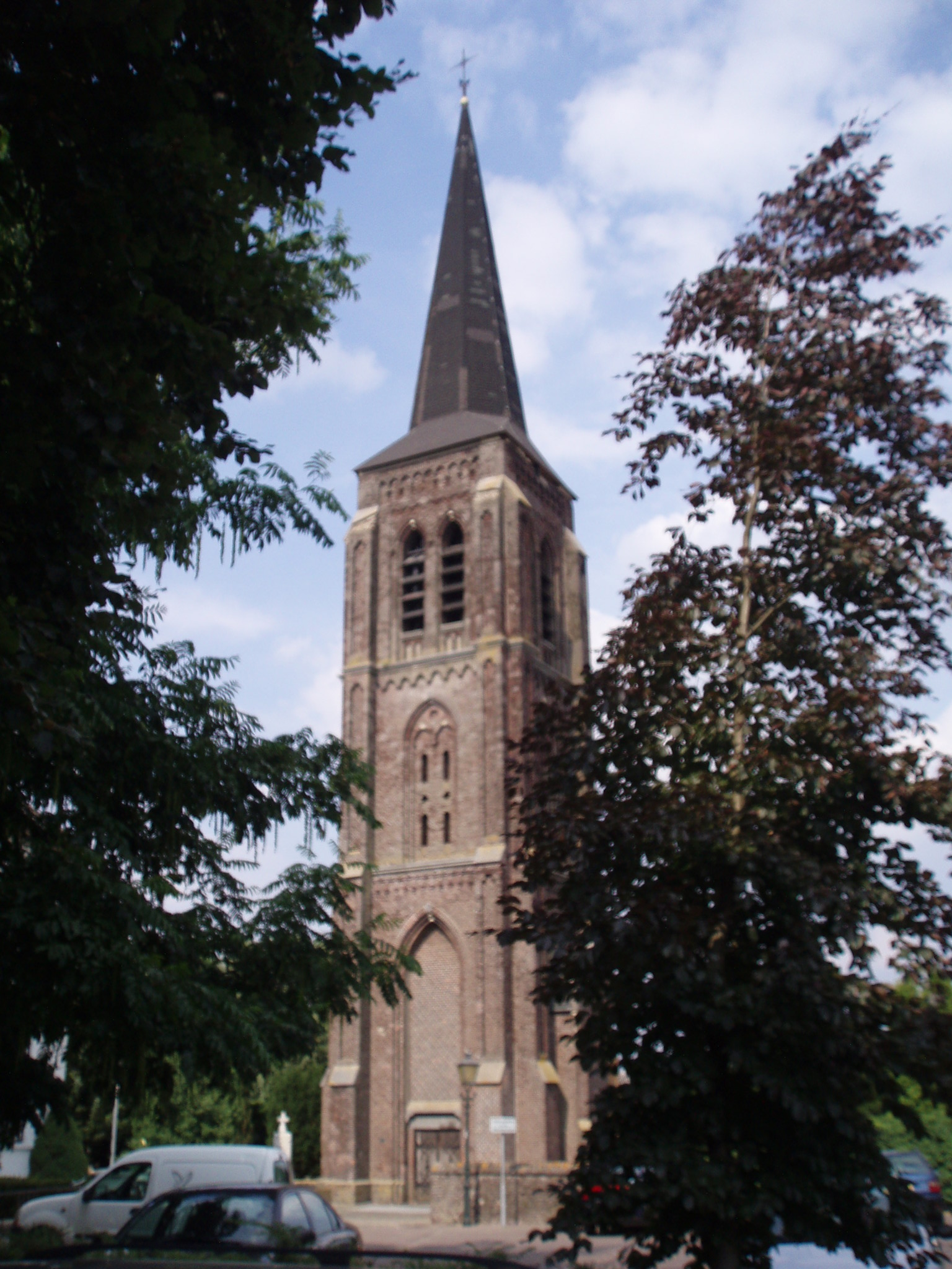 De oude Sint-Martinustoren te Gennep, de neogotische portaaltoren die toegang gaf tot de in 1944-1945 verwoeste kerk en werd gebouwd tussen 1868 en 1869. eigen foto (c) 2006 Looi